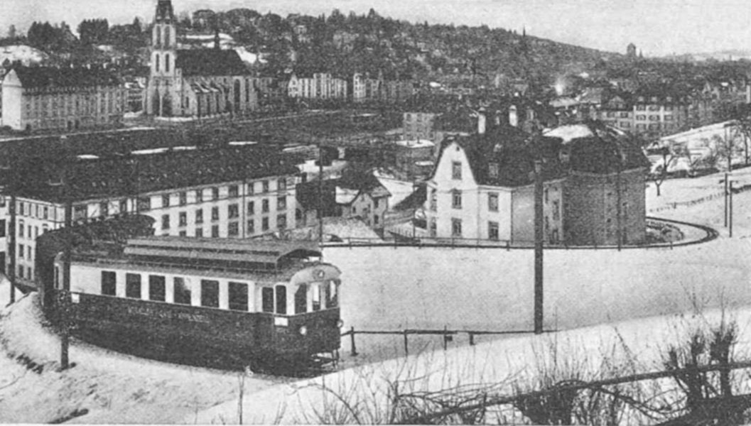 Zug mit SGA BCFeh 4/4 in der Ruckhaldenkurve bei St. Gallen mit Blick auf die Stadt